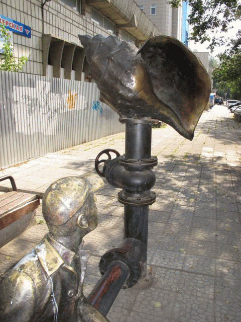 Ракушка